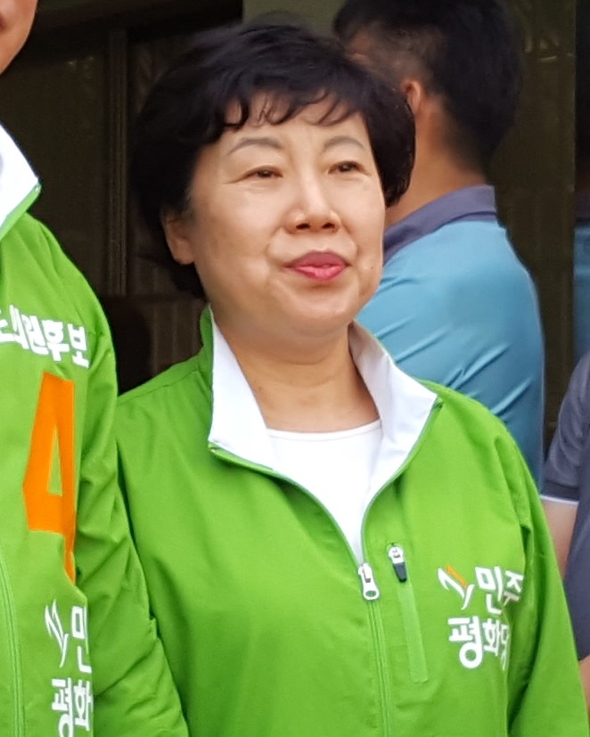 민주평화당의 이현웅 전주시장 후보 선거사무소 개소식에 참여한 조배숙